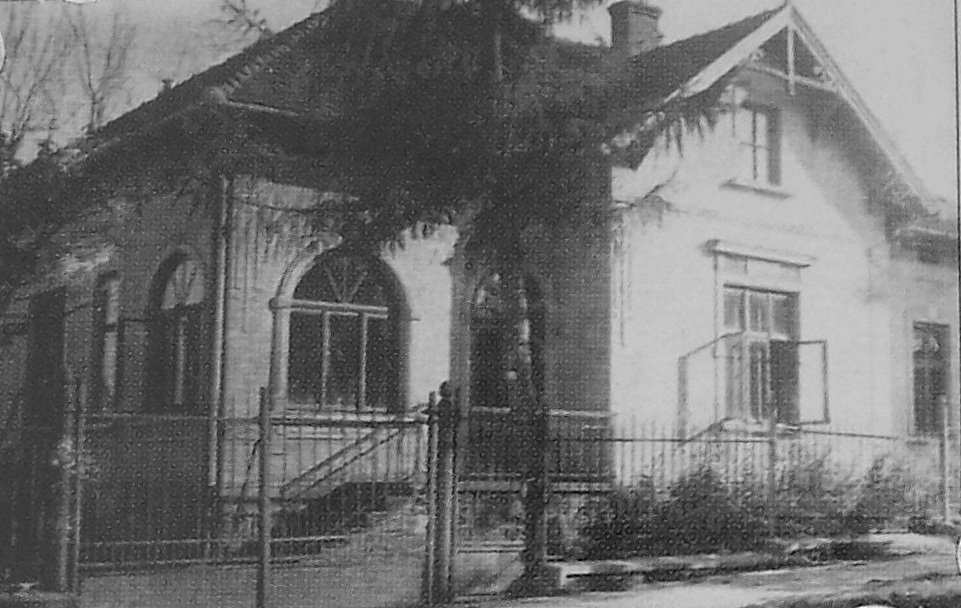 Dom przy ulicy Bartosza Głowackiego 19 w Sanoku. Widok na początku XX wieku.